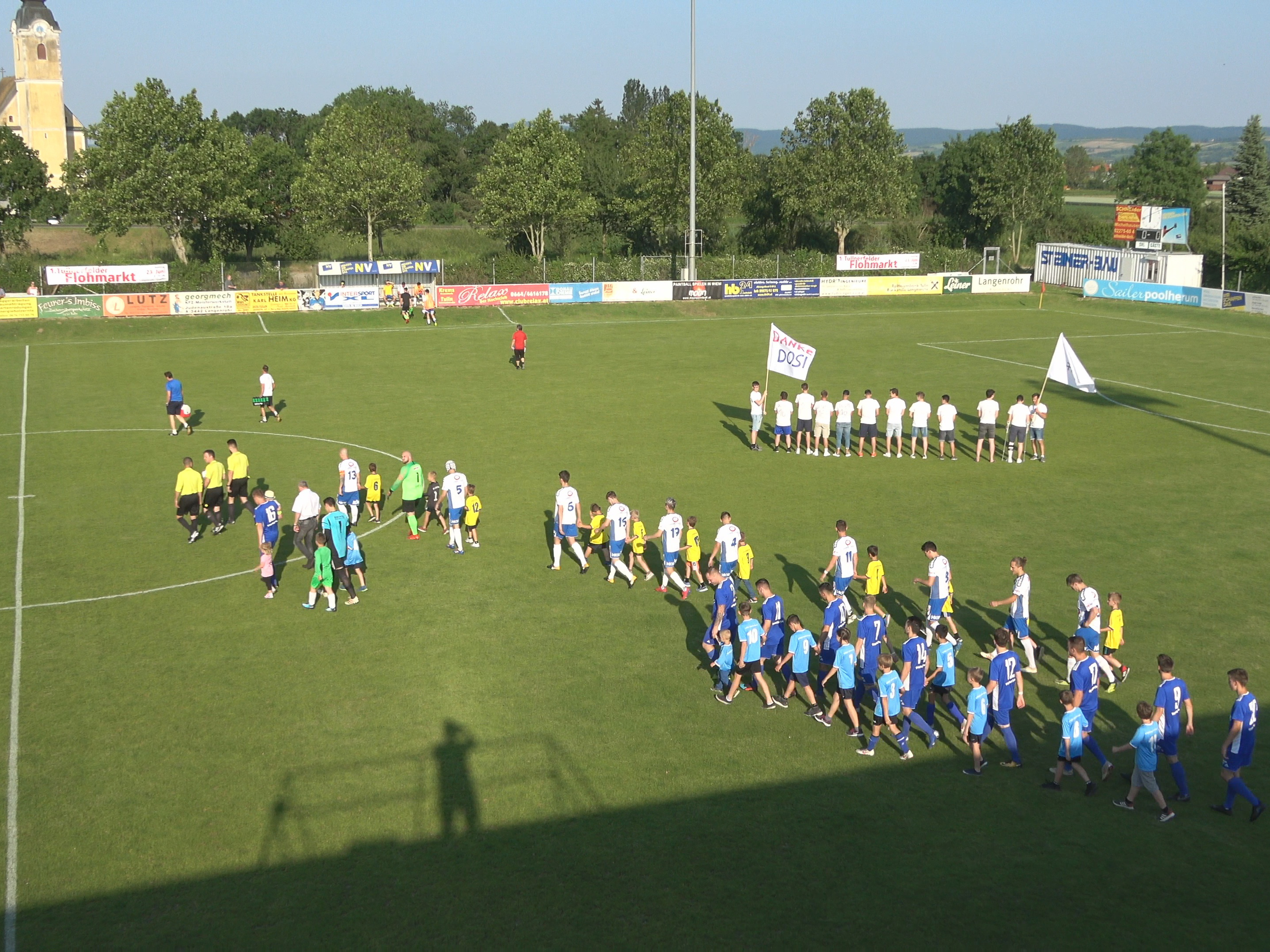 Fans verabschieden die Langenrohr-Vereinslegende Andreas Dospel beim letzten Heimspiel der Saison 2018/19 gegen SV Gaflenz